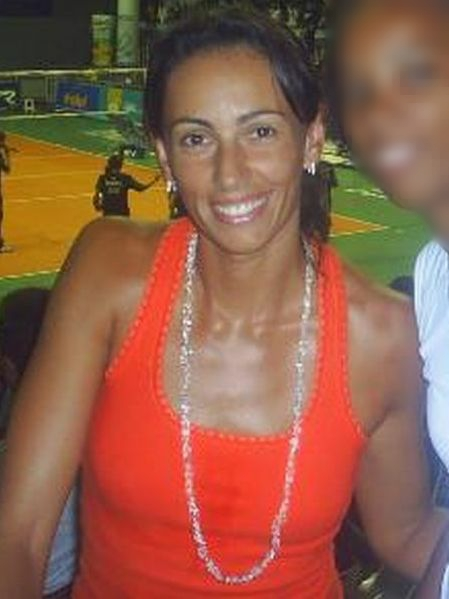 (Portuguese) Ana Paula, atleta brasileira do vôlei de praia